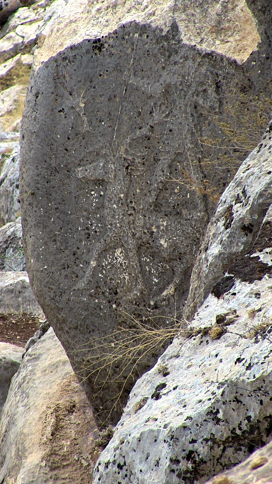 Späthethitisches Felsrelief am Karasu, türkische Provinz Gaziantep